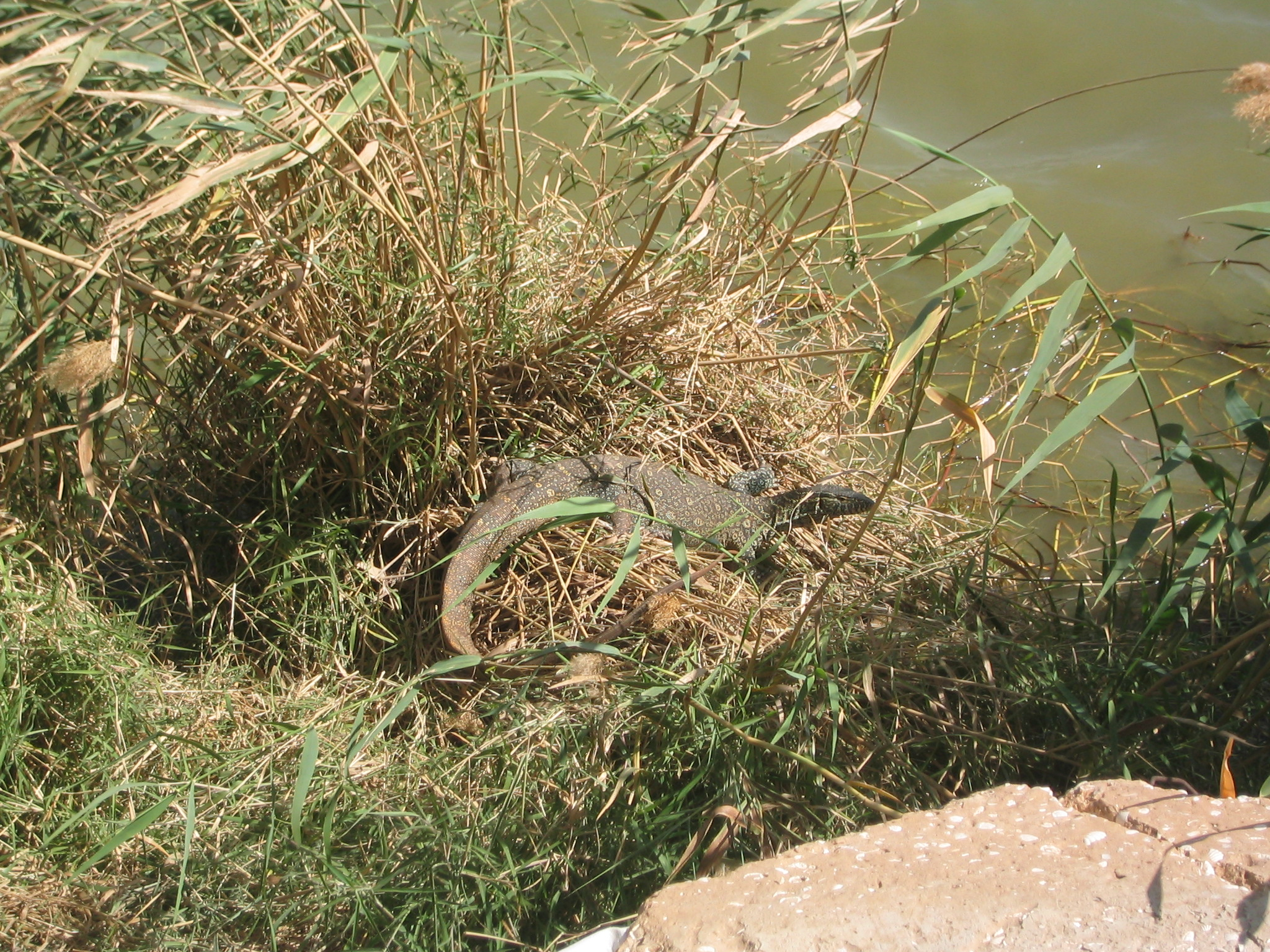 Varan au Parc national du Djoudj